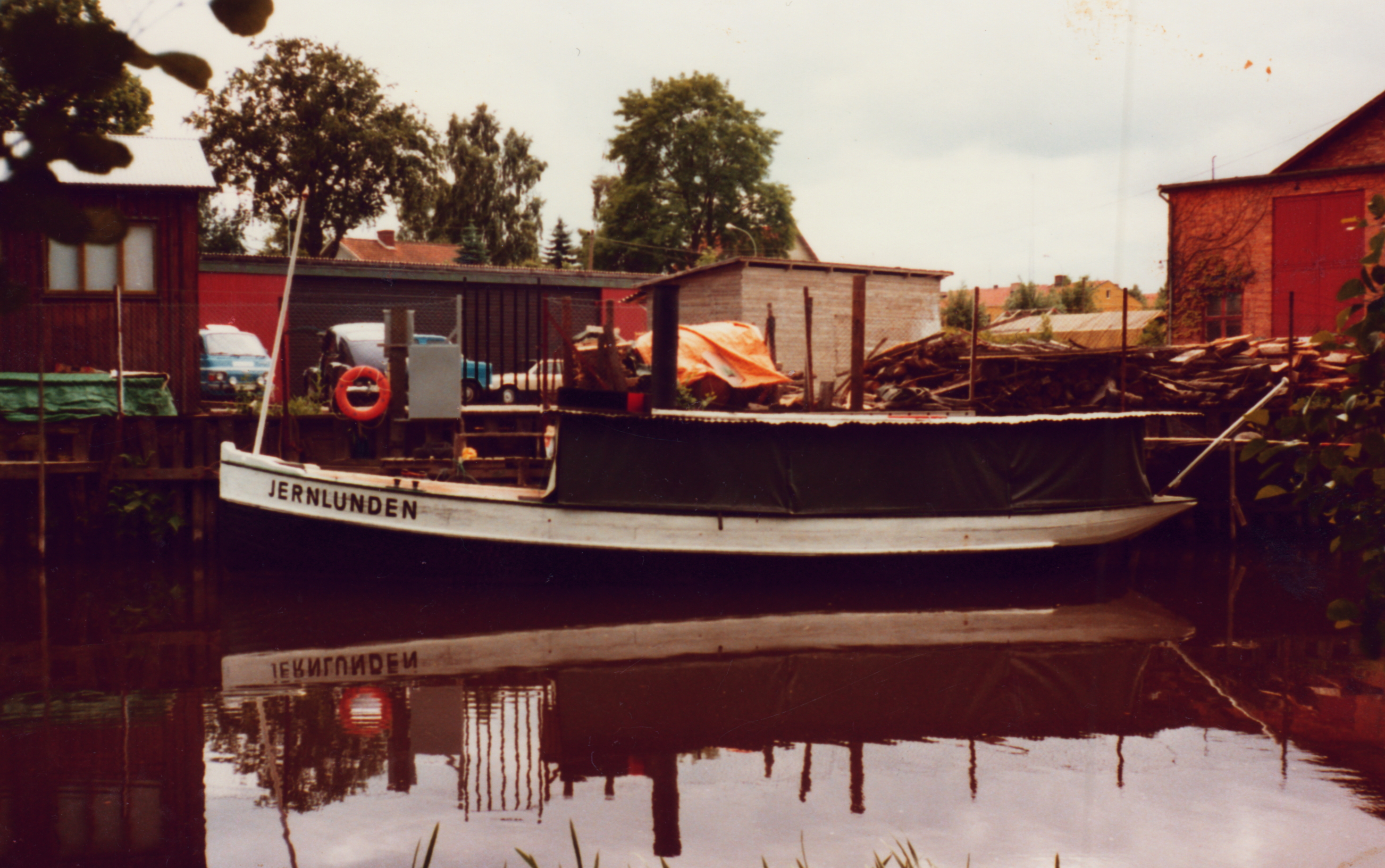 Rundtursbåten Jernlunden, Nolhaga, Alingsås, ca 1993